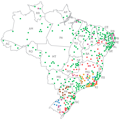 Distribuição geográfica das diferentes instituições que compõem a Mapa da Rede Federal de Educação Profissional, Científica e Tecnológica.